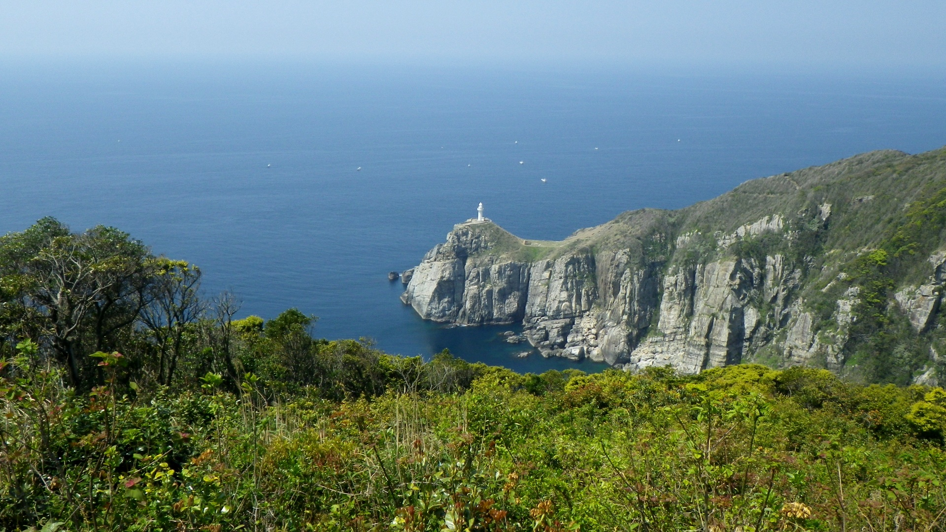 春の大瀬埼灯台。長崎県五島市玉之浦町玉之浦・大瀬崎園地展望台より。水平線は黄砂で霞んでいた。